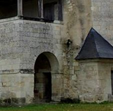 Traces ancien bâtiment roman.